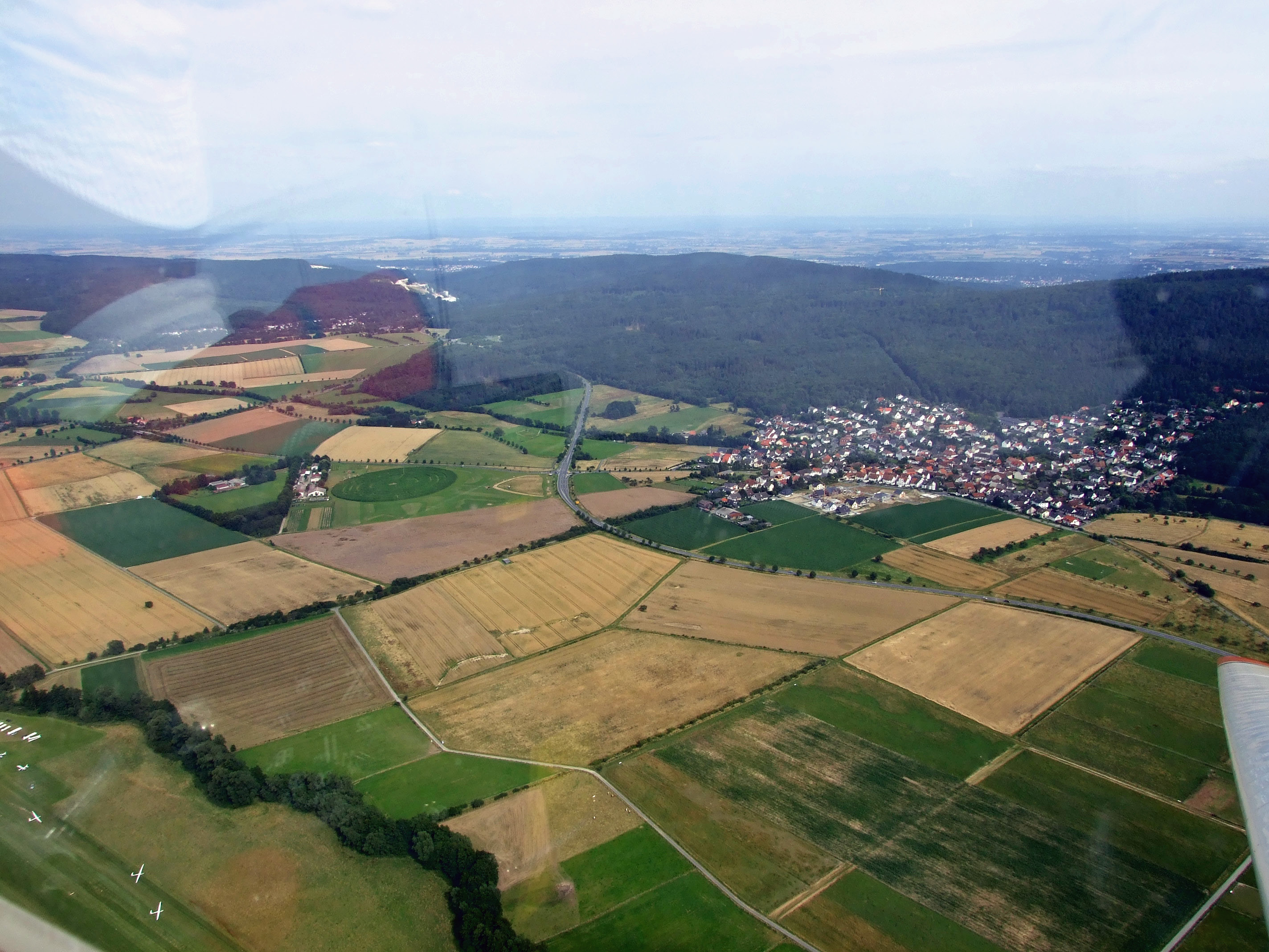 Obernhain (Wehrheim) im Taunus (Luftaufnahme)